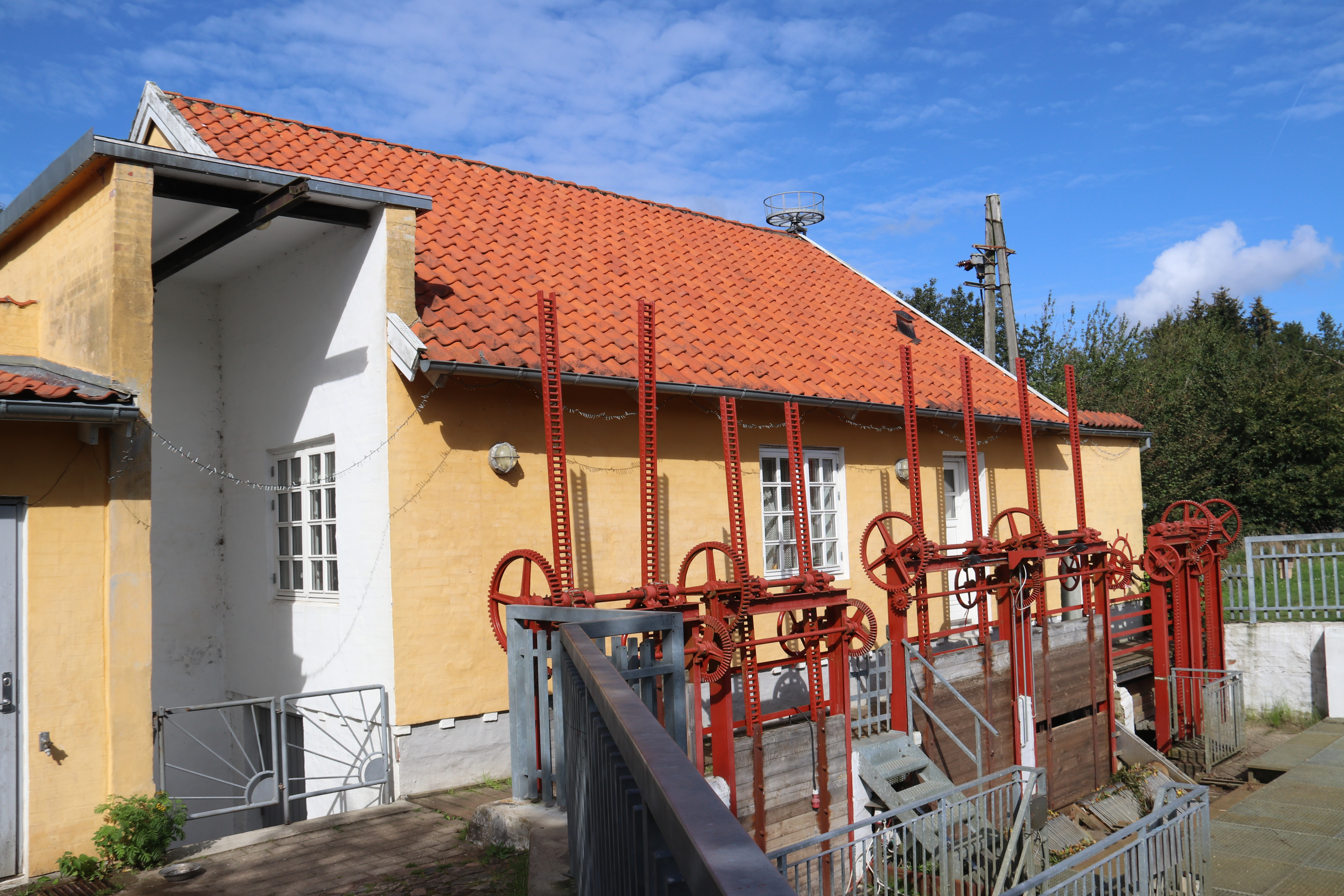 Wasserzulaufschieber Bindslev Gamle Elværk